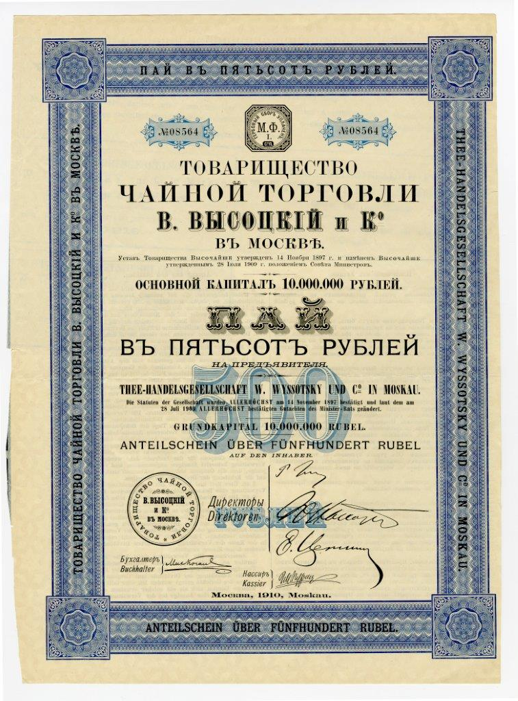 Пай в 500 руб. на предъявителя Товарищества чайной торговли В. Высоцкий и Ко в Москве.